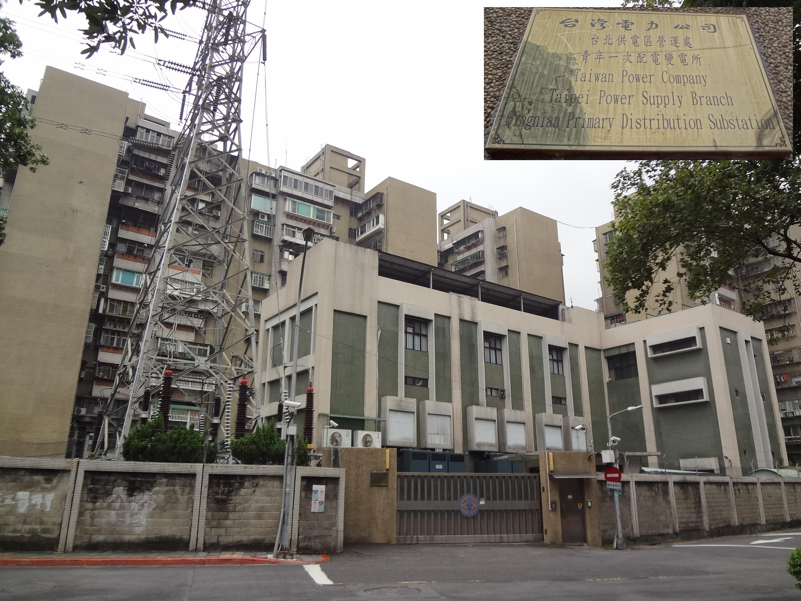 台灣電力公司台北供電區營運處青年一次配電變電所，位於臺北市萬華區中華路二段606巷，無門牌。